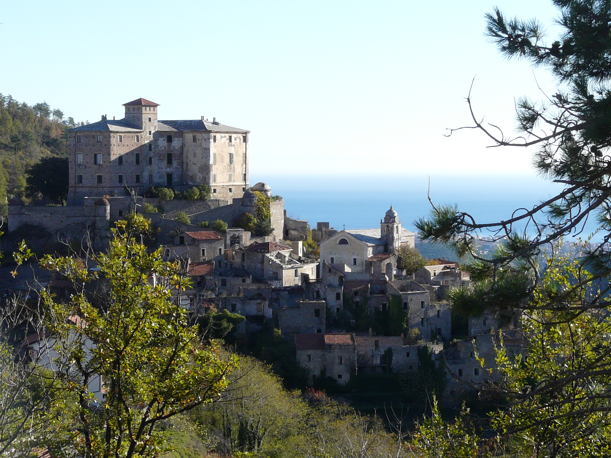 Panorama del borgo abbandonato di Balestrino Vecchia, Liguria, Italia